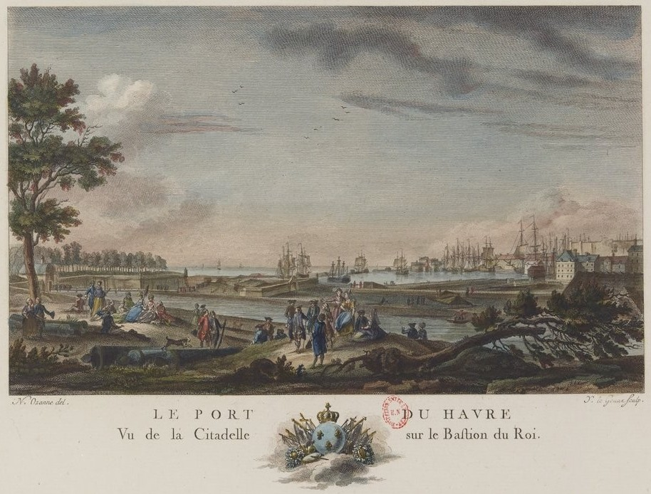 Planche tirée des Nouvelles vues perspectives des ports de France dessinées pour le Roi par M. Ozanne. Gravées par Y. Le Gouaz en 1776.